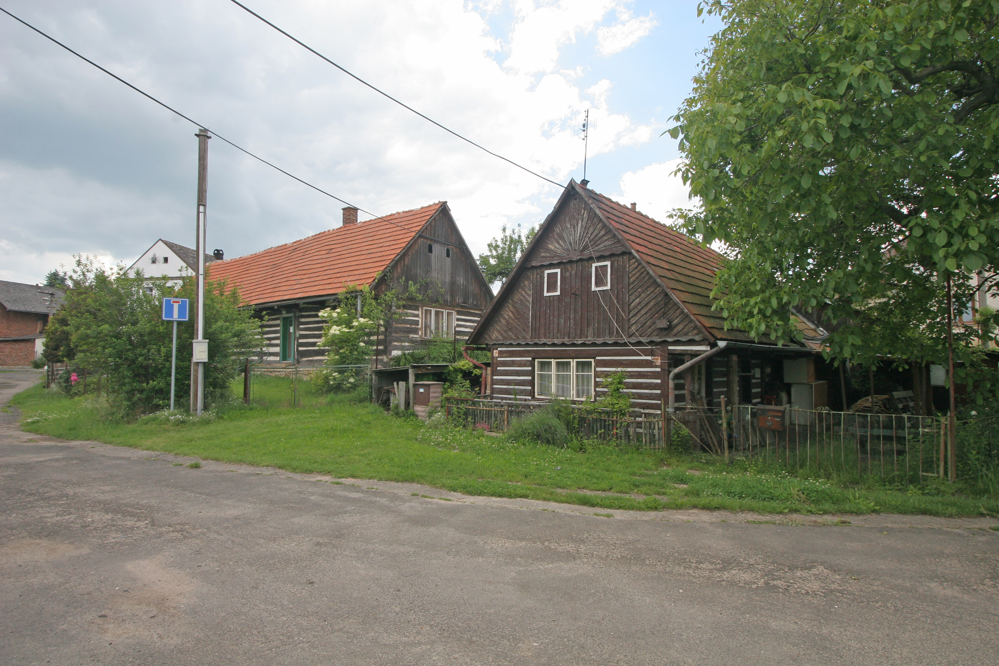 Dolní Černůtky čp. 16 a 17